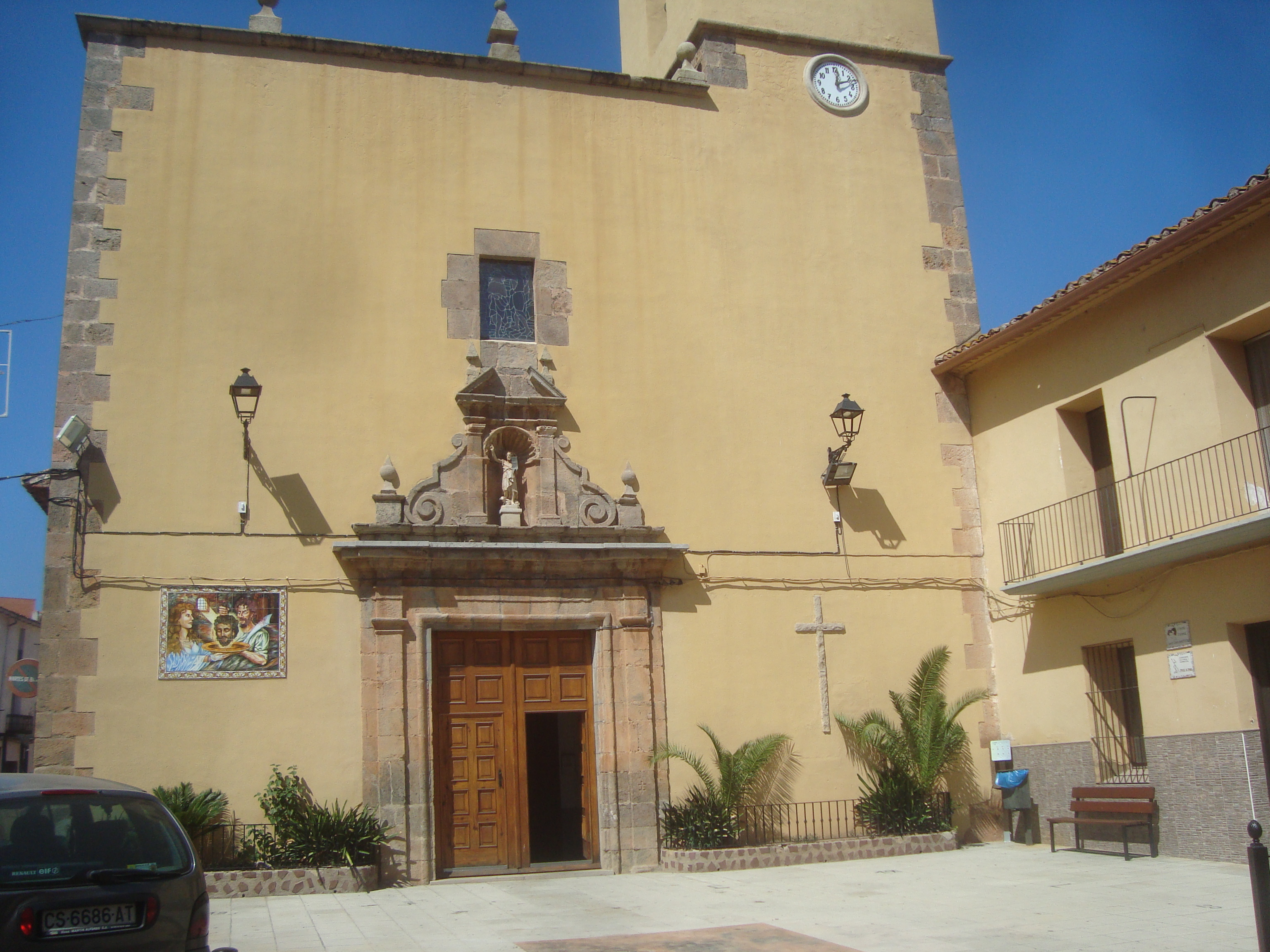 Església de Sant Joan Baptista (Tales)